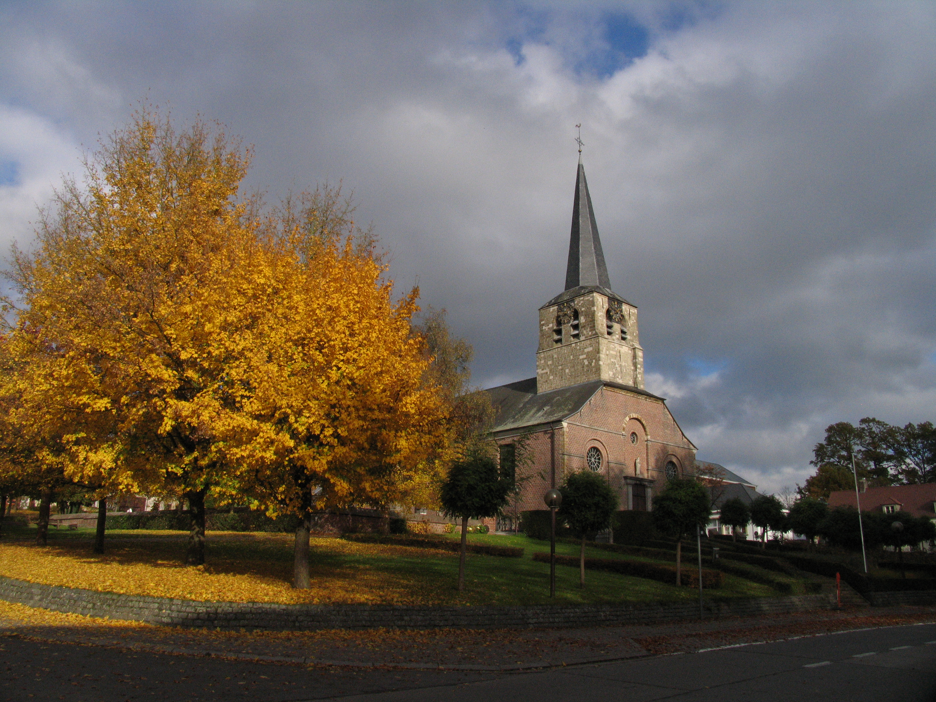 Herzele - Steenhuize-Wijnhuize - Kloosterstraat - OLV Hemelvaartkerk This photo of immovable heritage has been taken in the Flemish Region